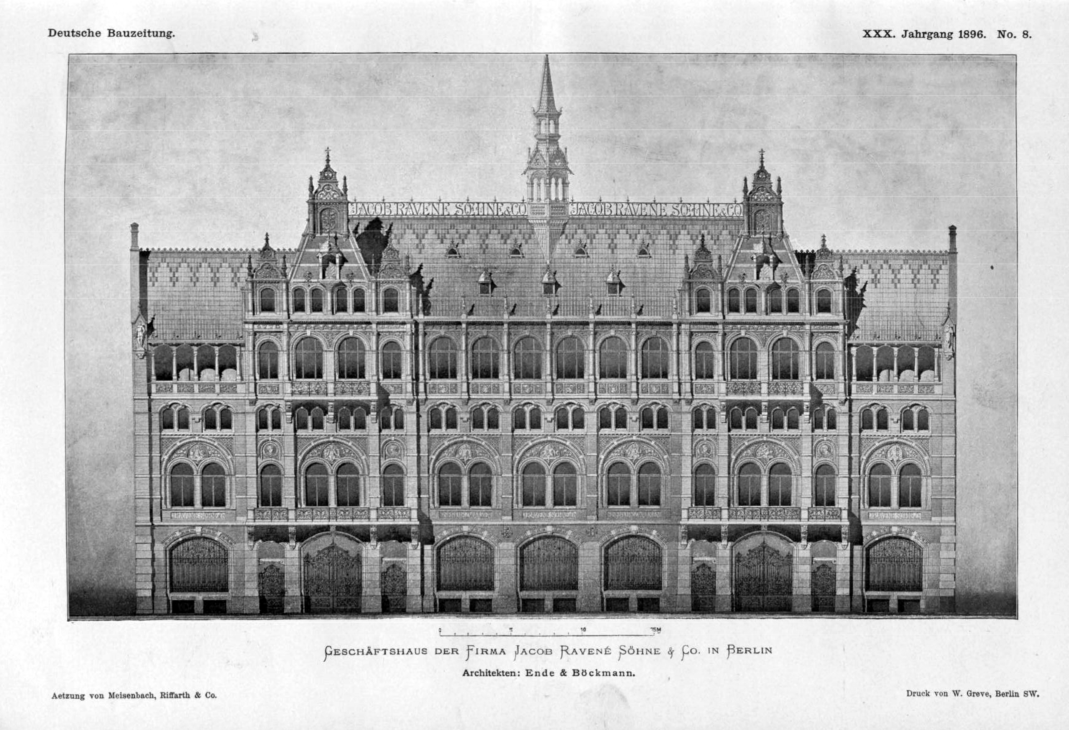 Geschäftshaus der Firma Jakob Ravené Söhne & Co., Wallstraße 5-8, Fassade.